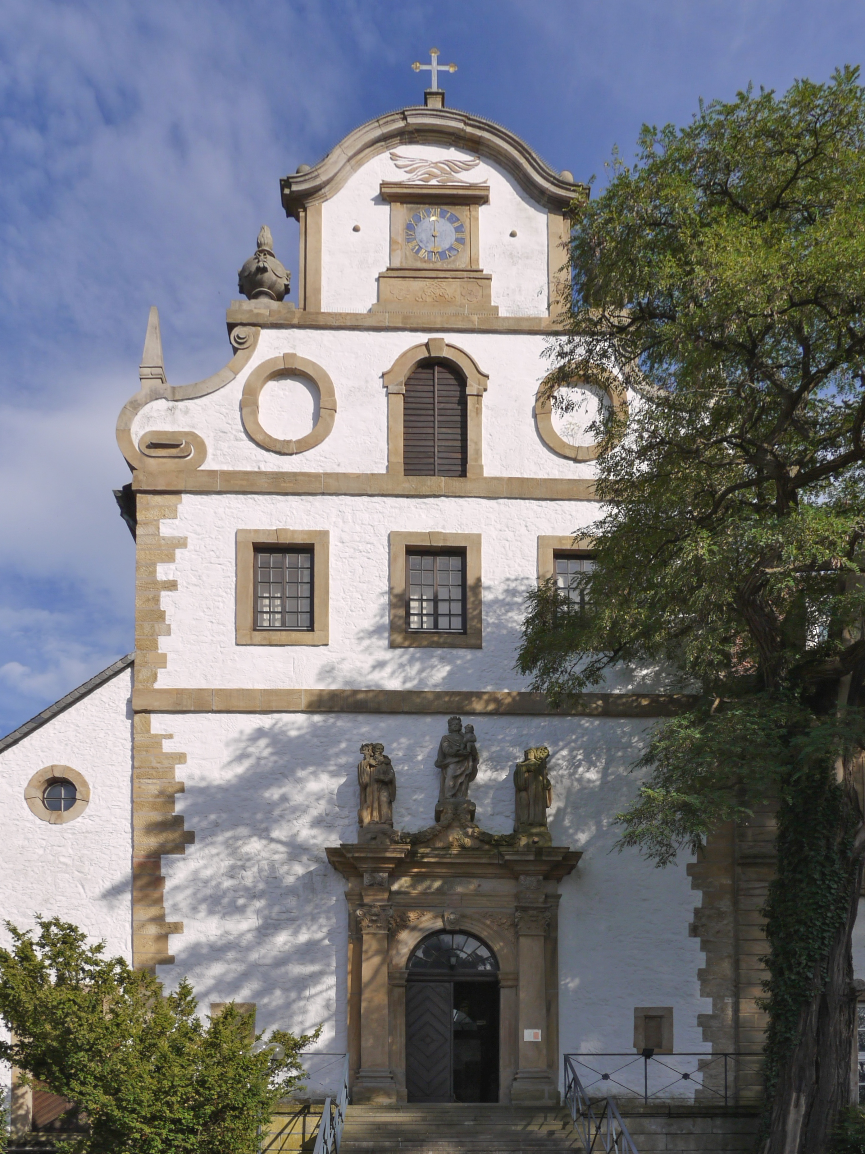 Katholische Abdon-und-Sennen-Kirche in Salzgitter-Ringelheim (Schlosskirche)